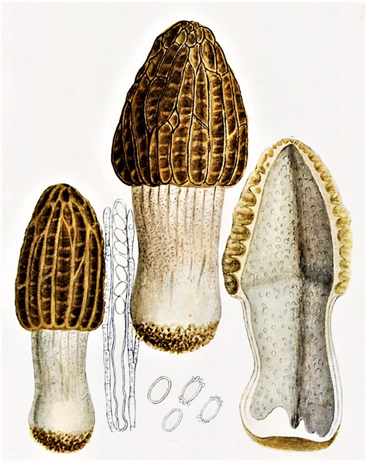 Giacomo Bresadola: Morchella elata Fr., 1822